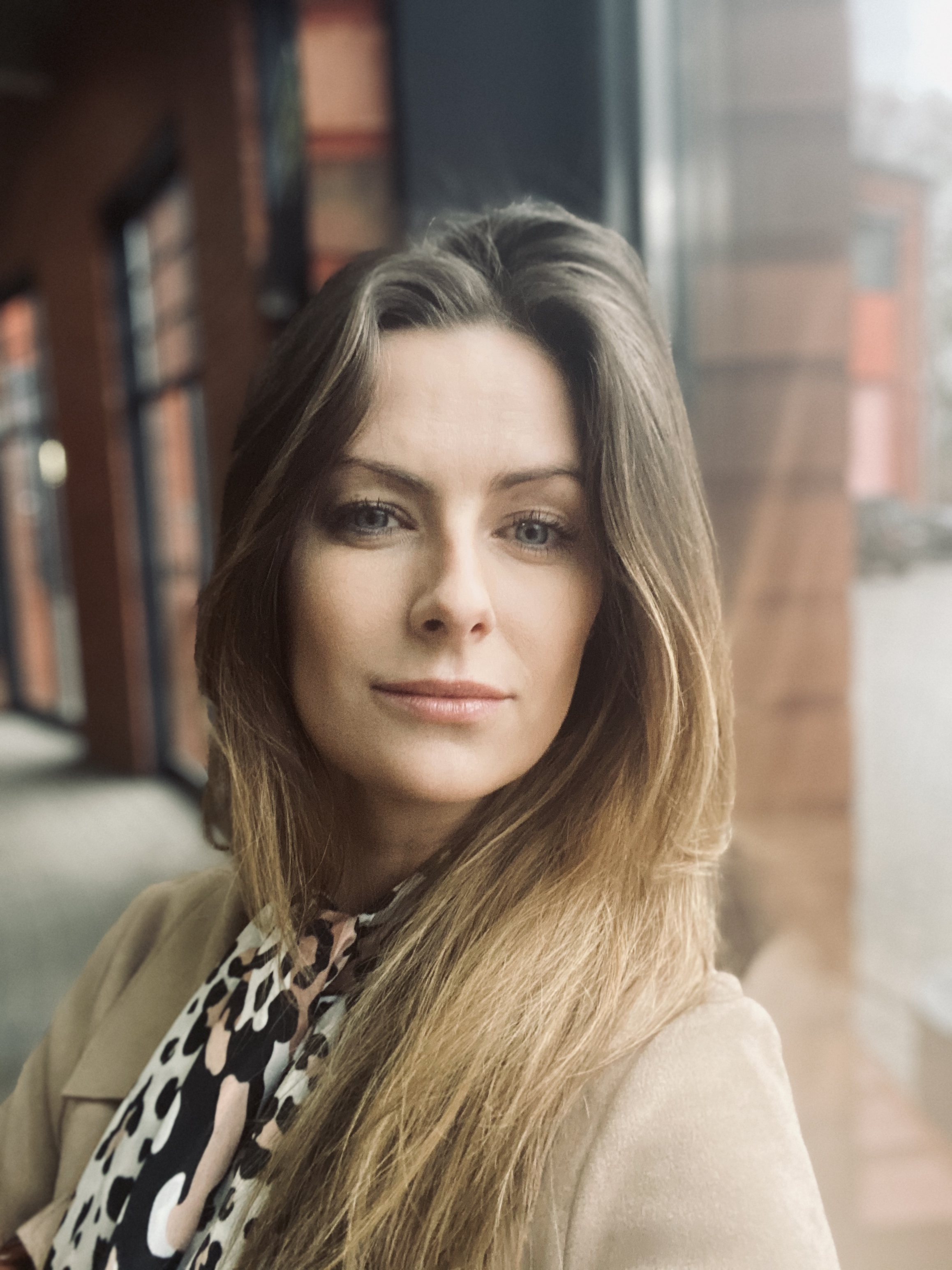 Selfie polskiej aktorki Laury Breszki.